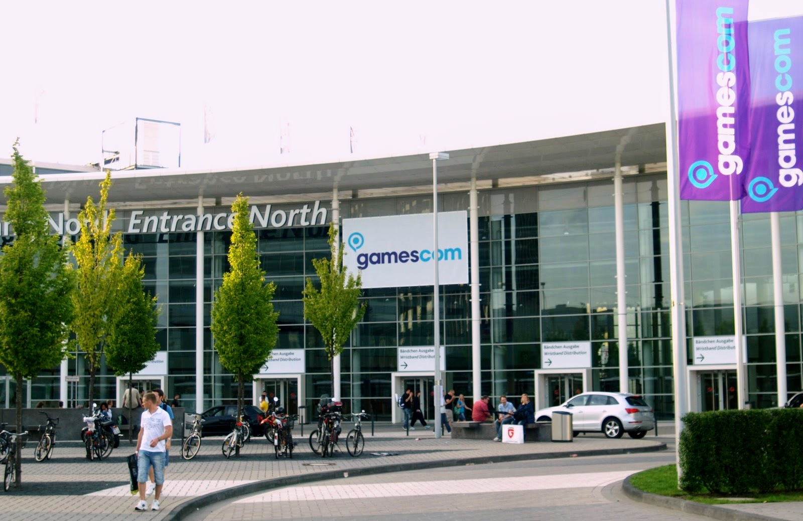 Vista de la entrada norte del Koelnmesse, centro de convenciones situado en Colonia, durante la celebración de la feria de videojuegos Gamescom, en agosto de 2009.